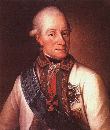 российский флотоводец, мореплаватель, адмирал В. Я. Чичагов (1726—1809)